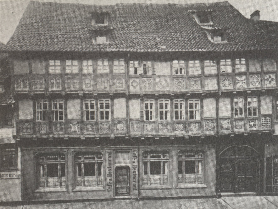 Haus in der Breiten Straße in Quedlinburg